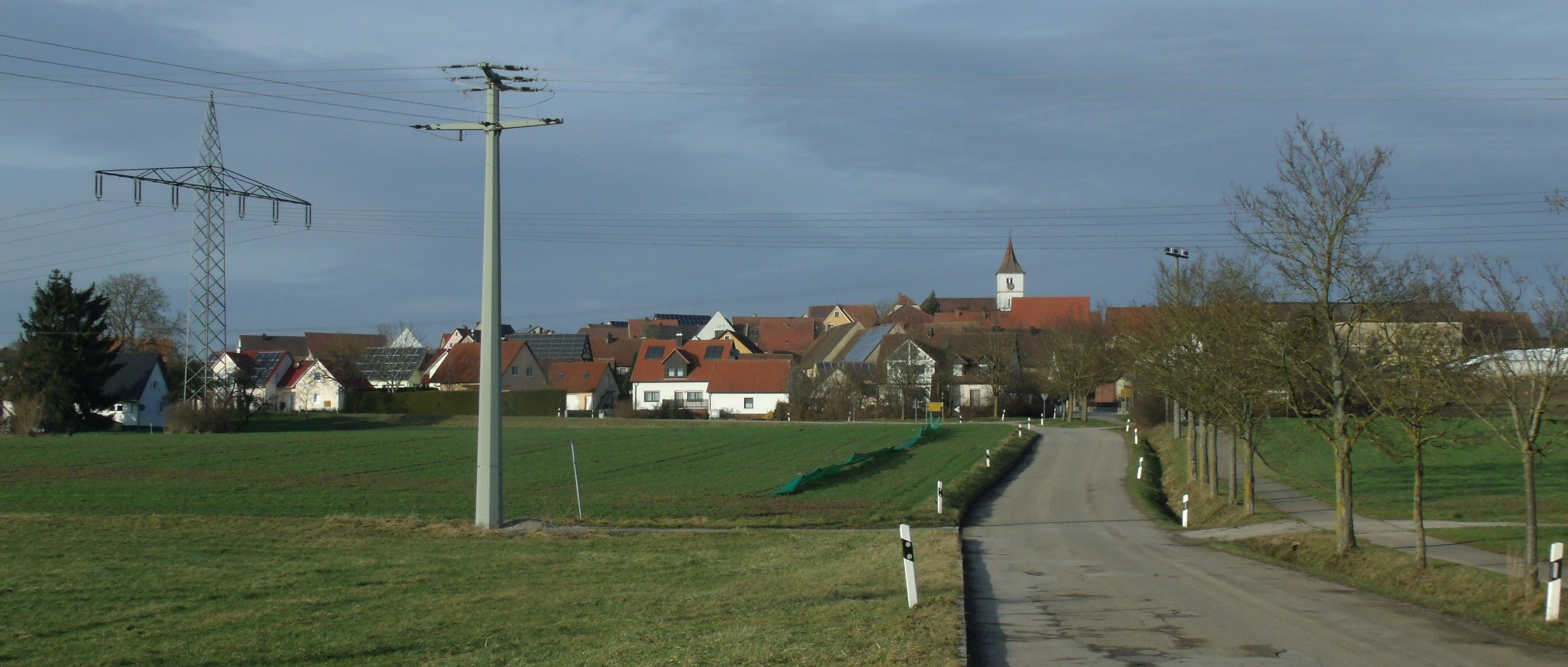 Neunkirchen, Ortsteil von Leutershausen im Landkreis Ansbach, Ortsansicht von Neunkirchen-Siedlung aus